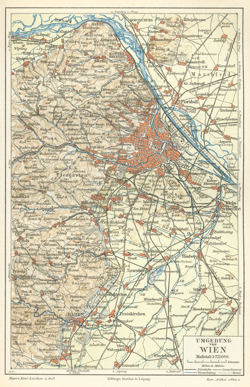 Plan der Umgebung von Wien